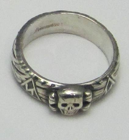 SS-Ehrenring oder auch Totenkopfring